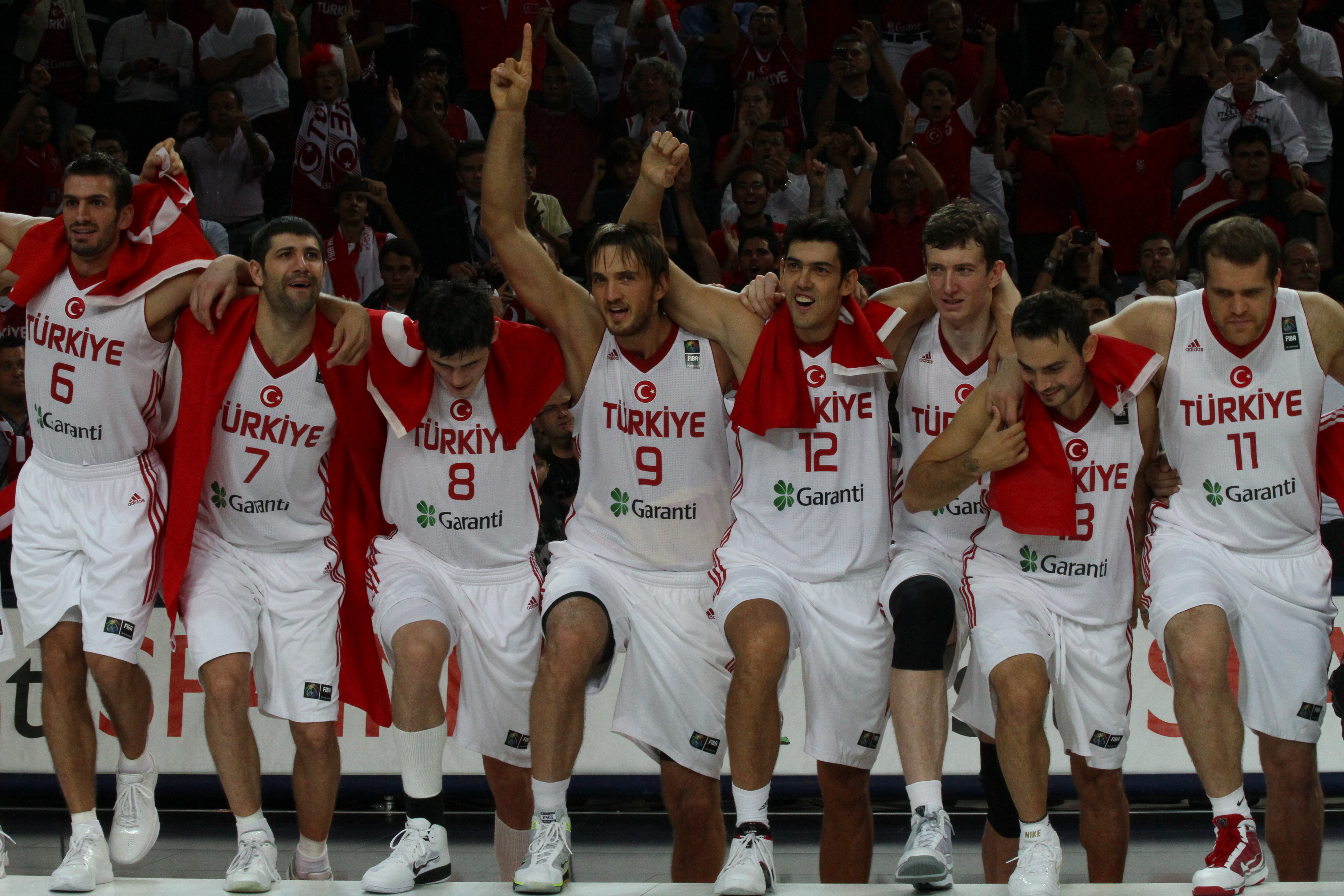 La selección de Turquía celebra su segundo puesto en el Mundial de baloncesto 2010.